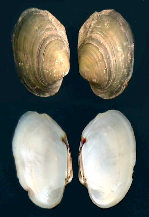 Vistas externas e internas de Anodontites trapesialis del estado Portuguesa - Venezuela